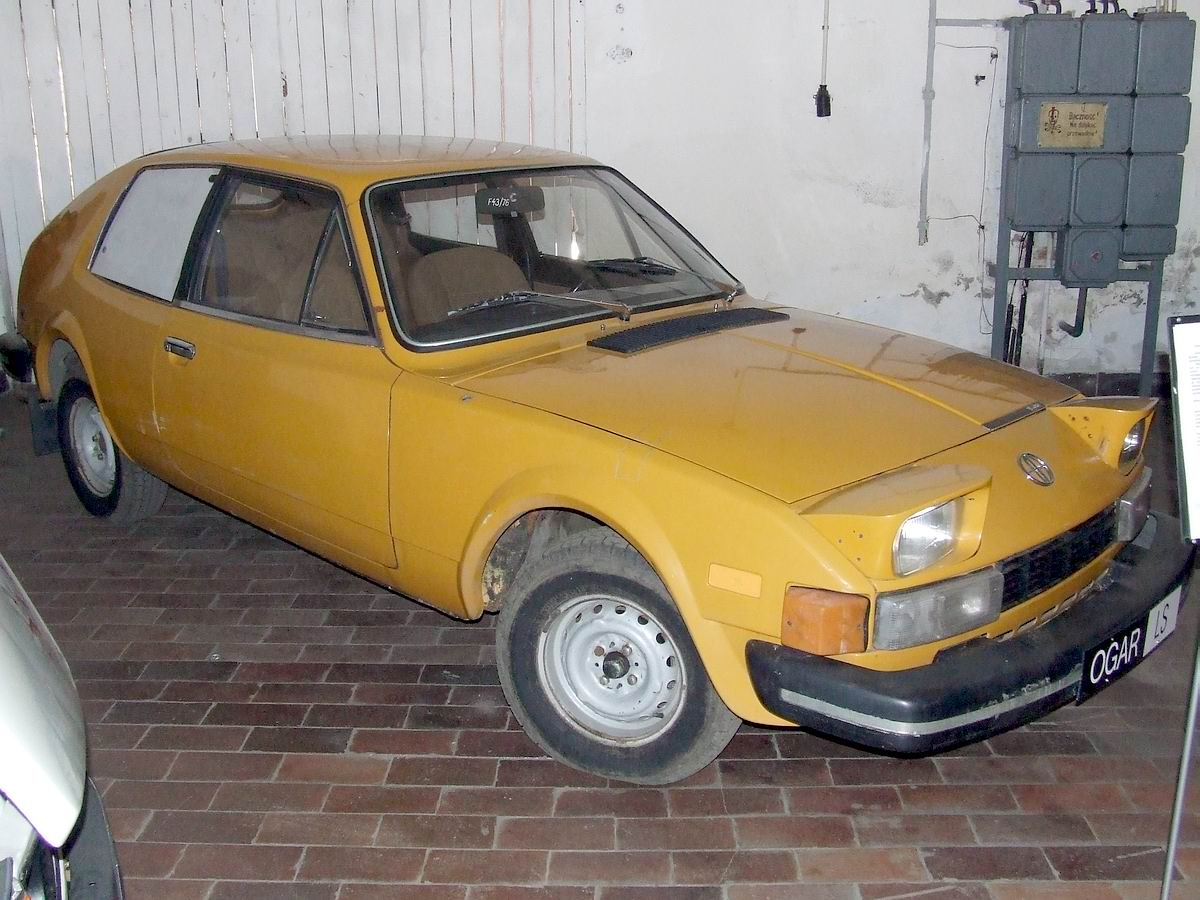 FSO Ogar w Muzeum Techniki w Warszawie